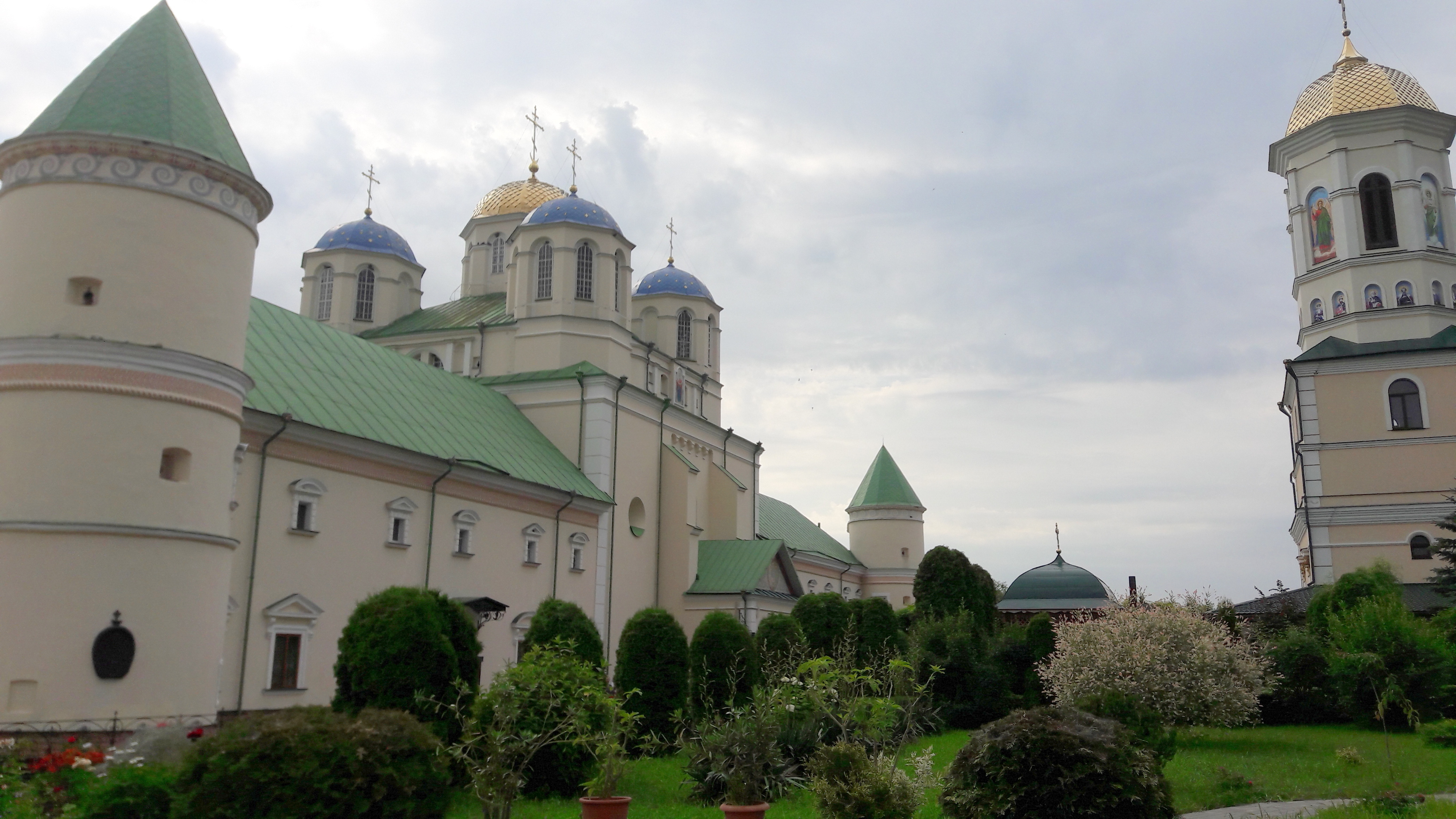 Mežiryčų stačiatikių Šventosios Trejybės vienuolynas netoli Ostrogo, Ukrainoje